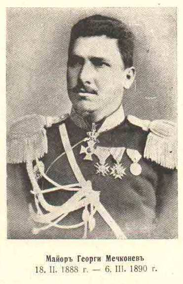 Полковник Мечконев